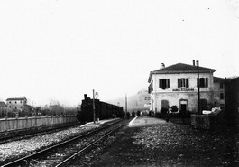 Convoglio a vapore sul secondo binario della stazione.